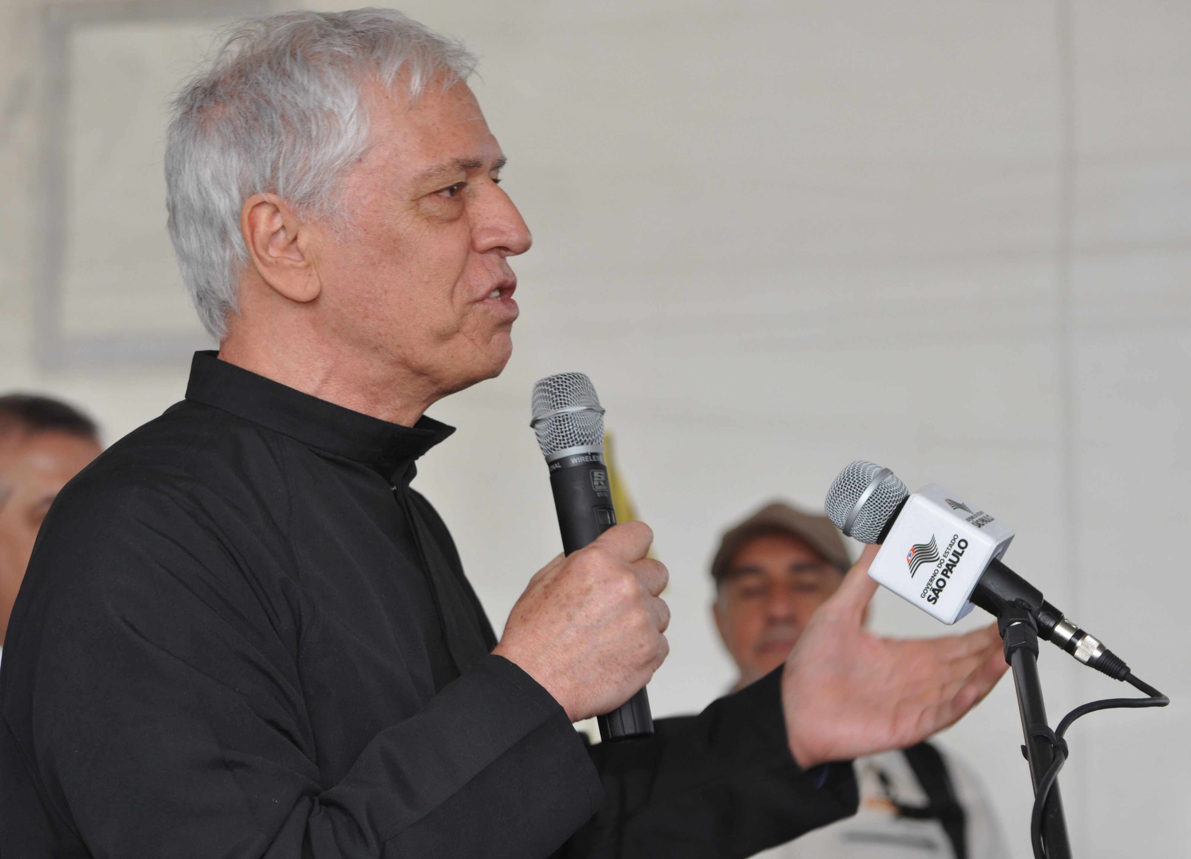 Lançamento Passos dos Jesuítas - Itanhaém (14)